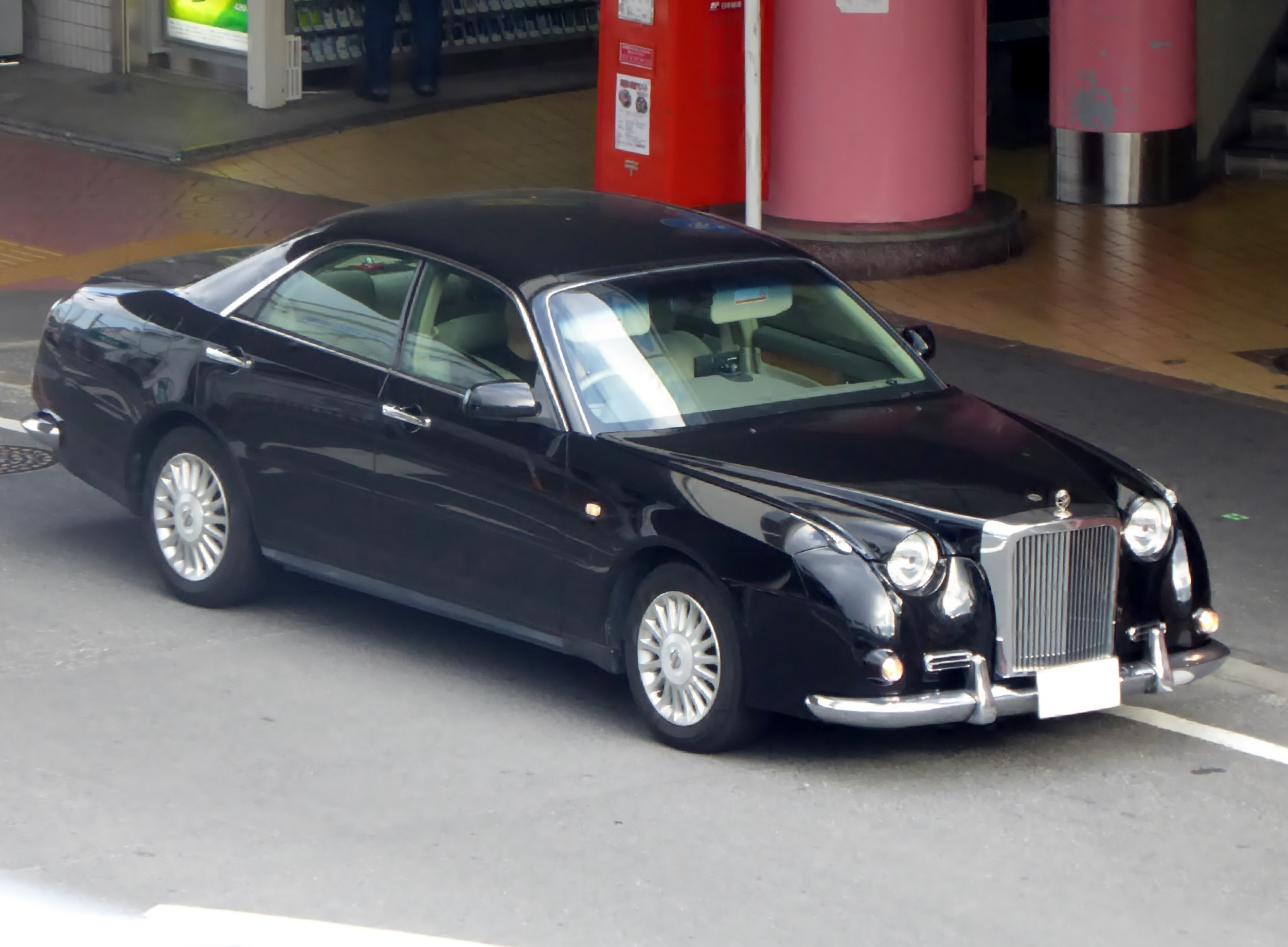 Y34型光岡・ガリューIIをフロントから撮影。